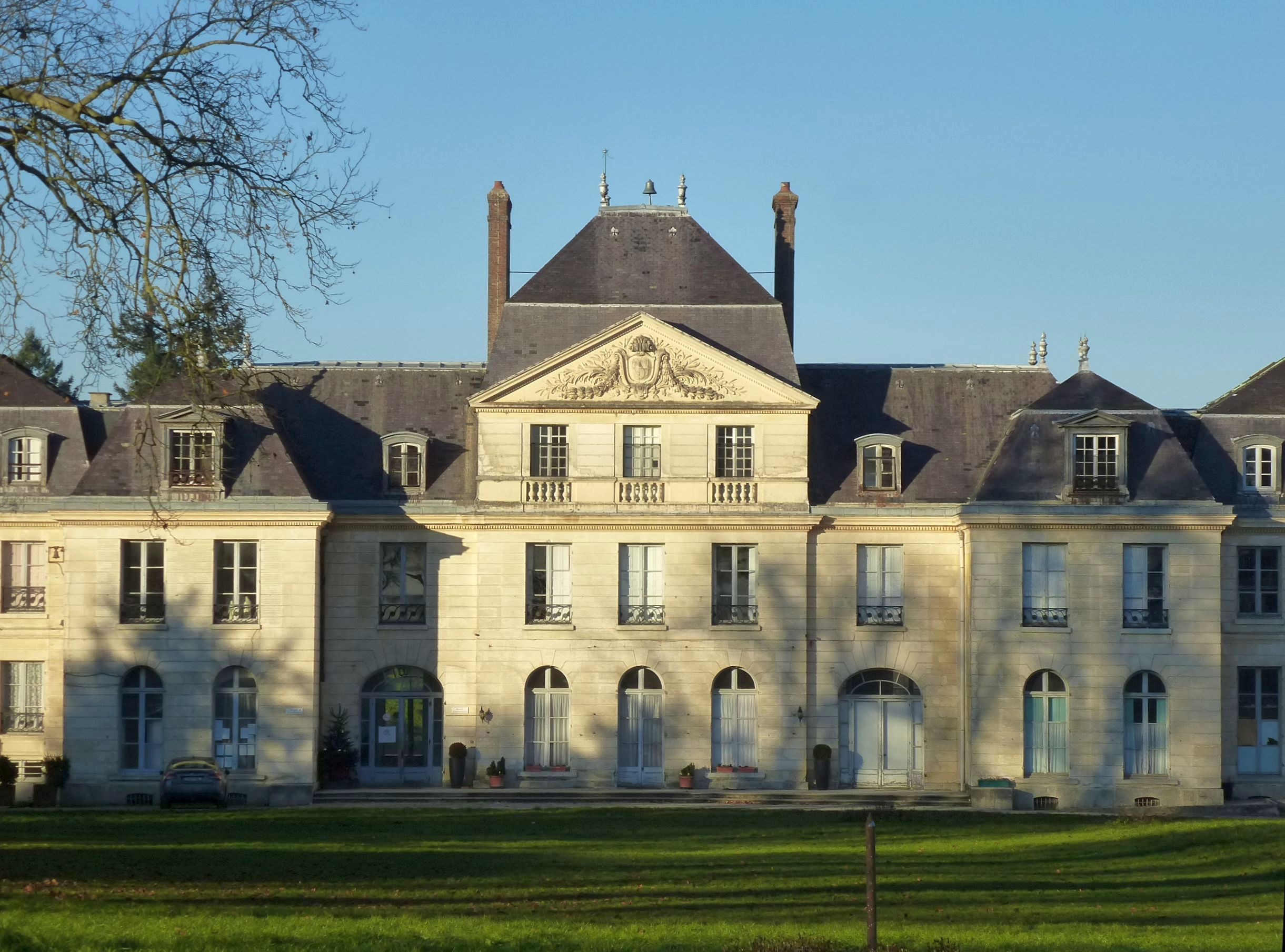 Château de Forges. (département de la Seine-et-Marne, région Île-de-France).